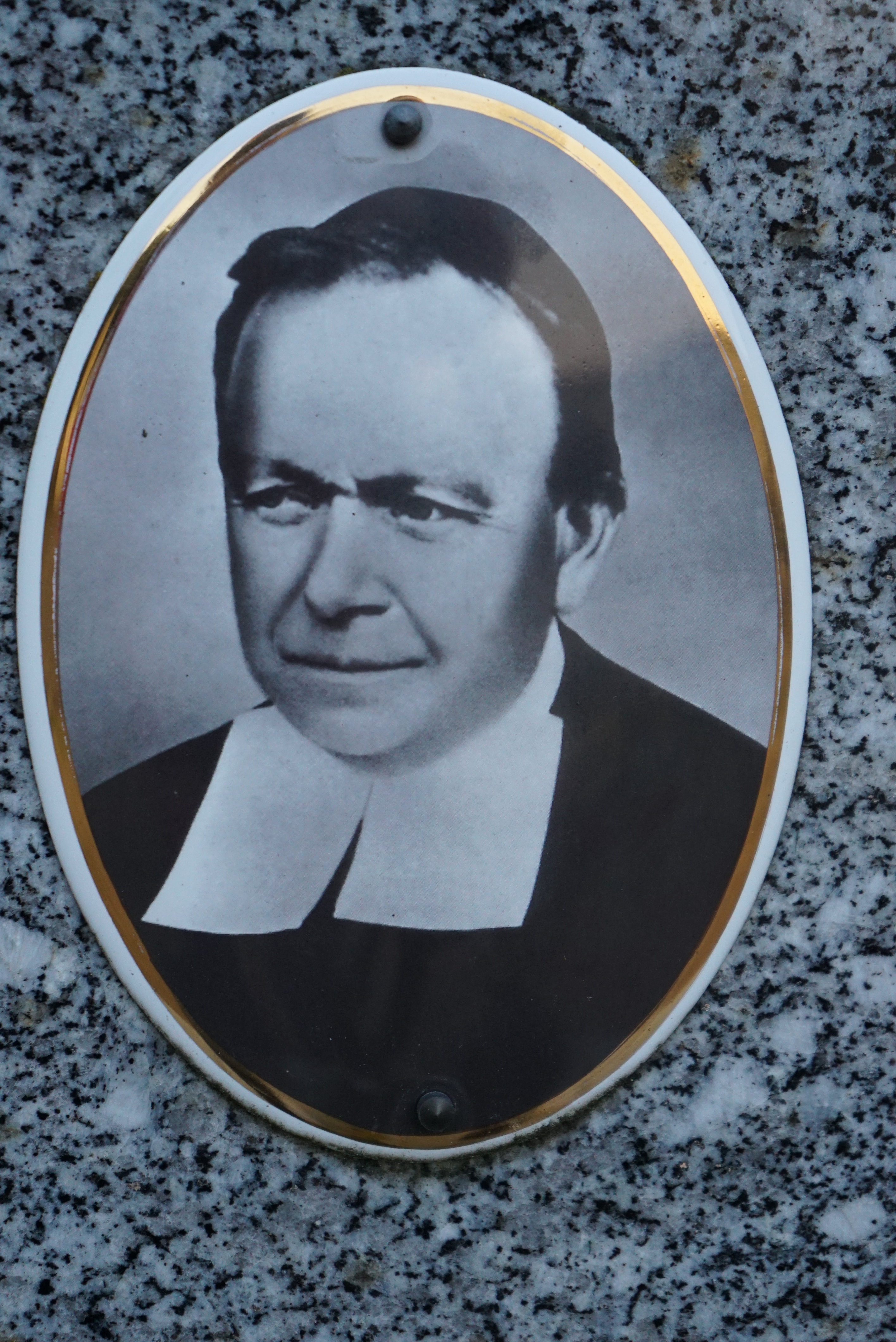 concession frères des écoles chrétiennes cimetière du nord Reims.